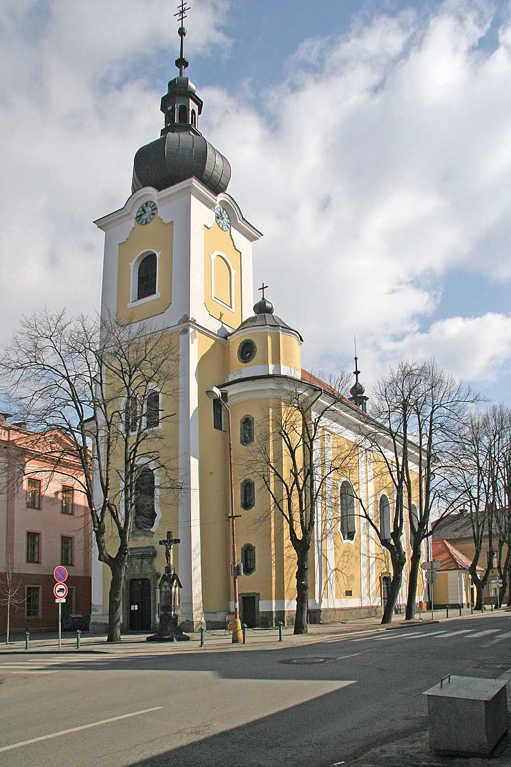 Třebechovice pod Orebem, kostel Sv. Ondřeje, district Hradec Králové, Czech Republic autor: Prazak date: 23. 3. 2006